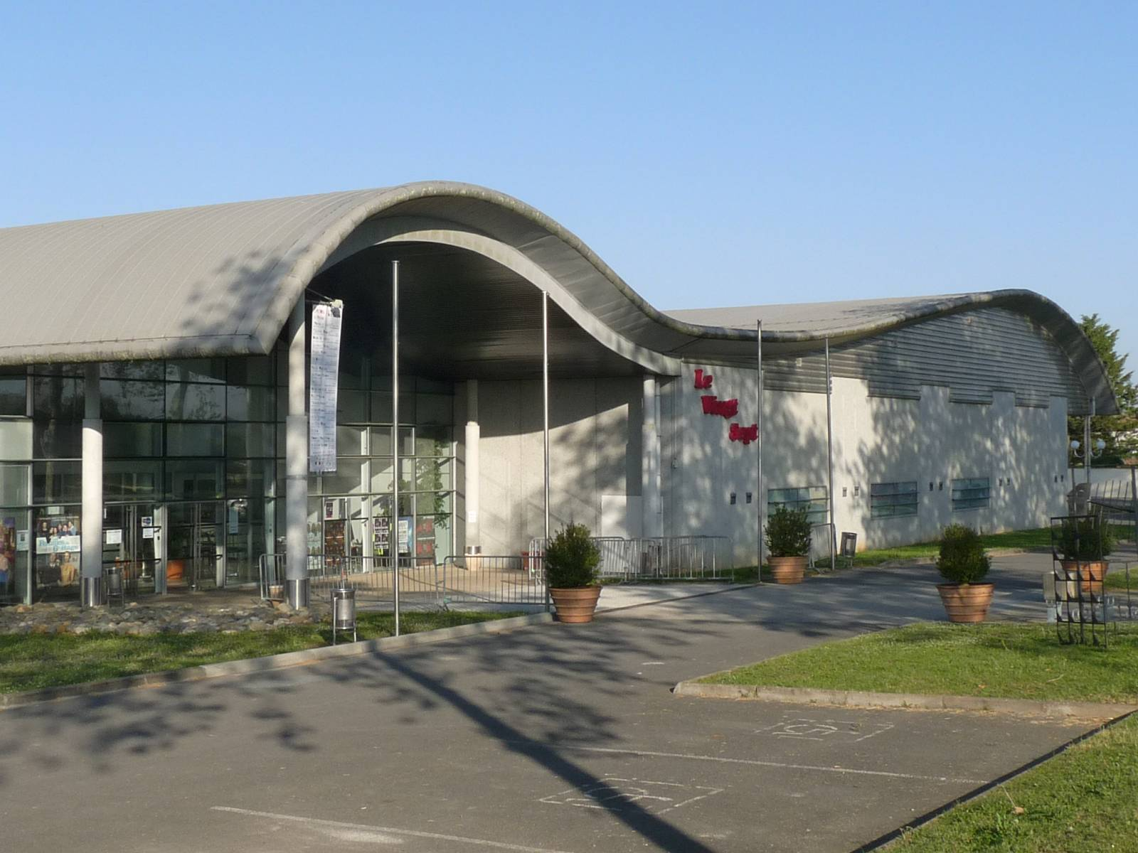 Le "27", centre commercial et culturel de Rouillac, Charente, France